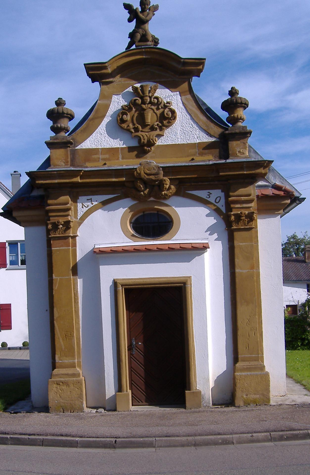 Maria-Hilf-Kapelle Reimlingen